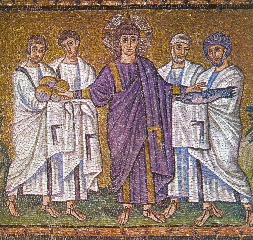 Mosaic in Basilica of Sant'Apollinare Nuovo.